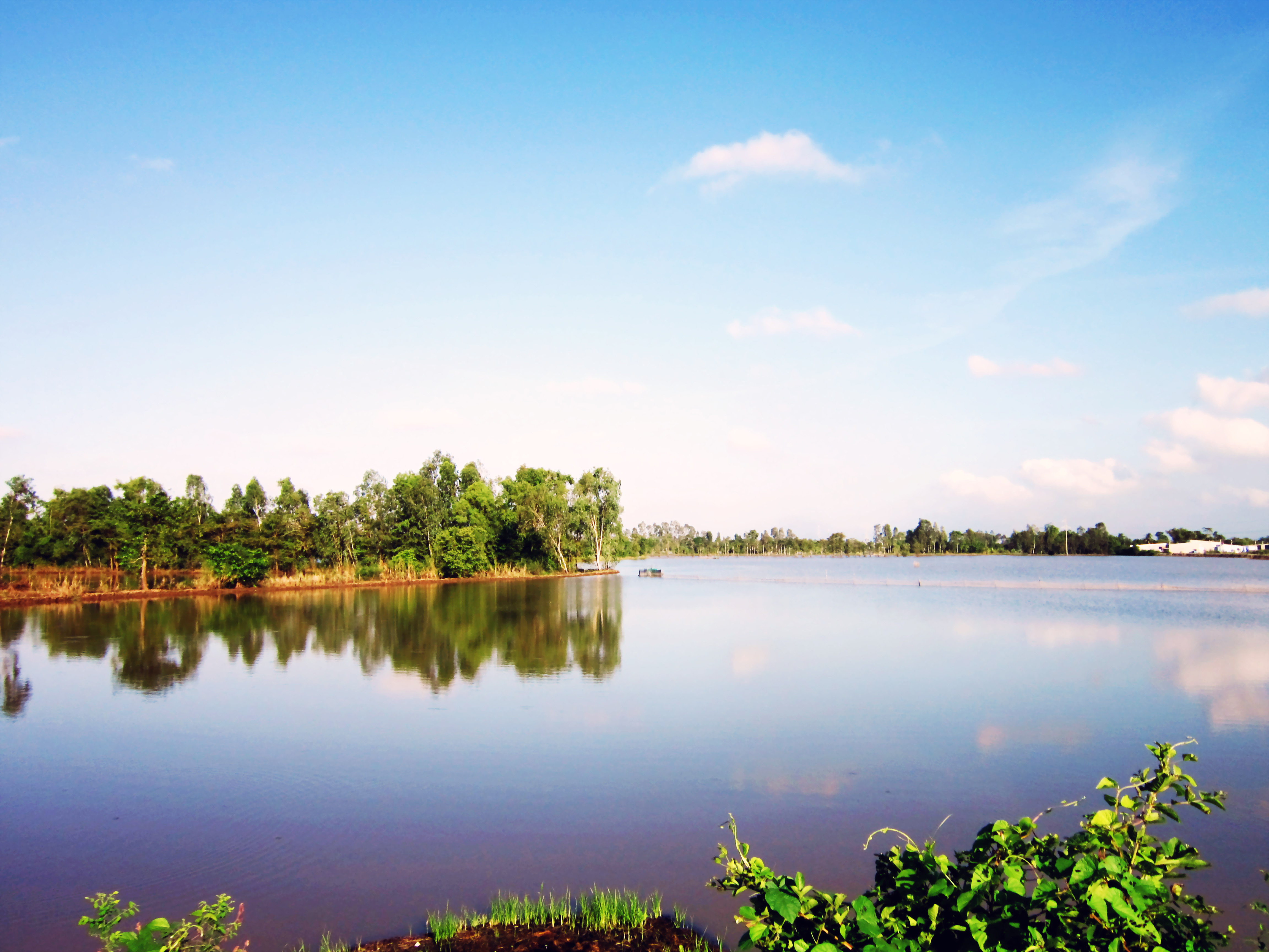 Một cánh đồng ở Long Xuyên (An Giang, Việt Nam) bị ngập nước.